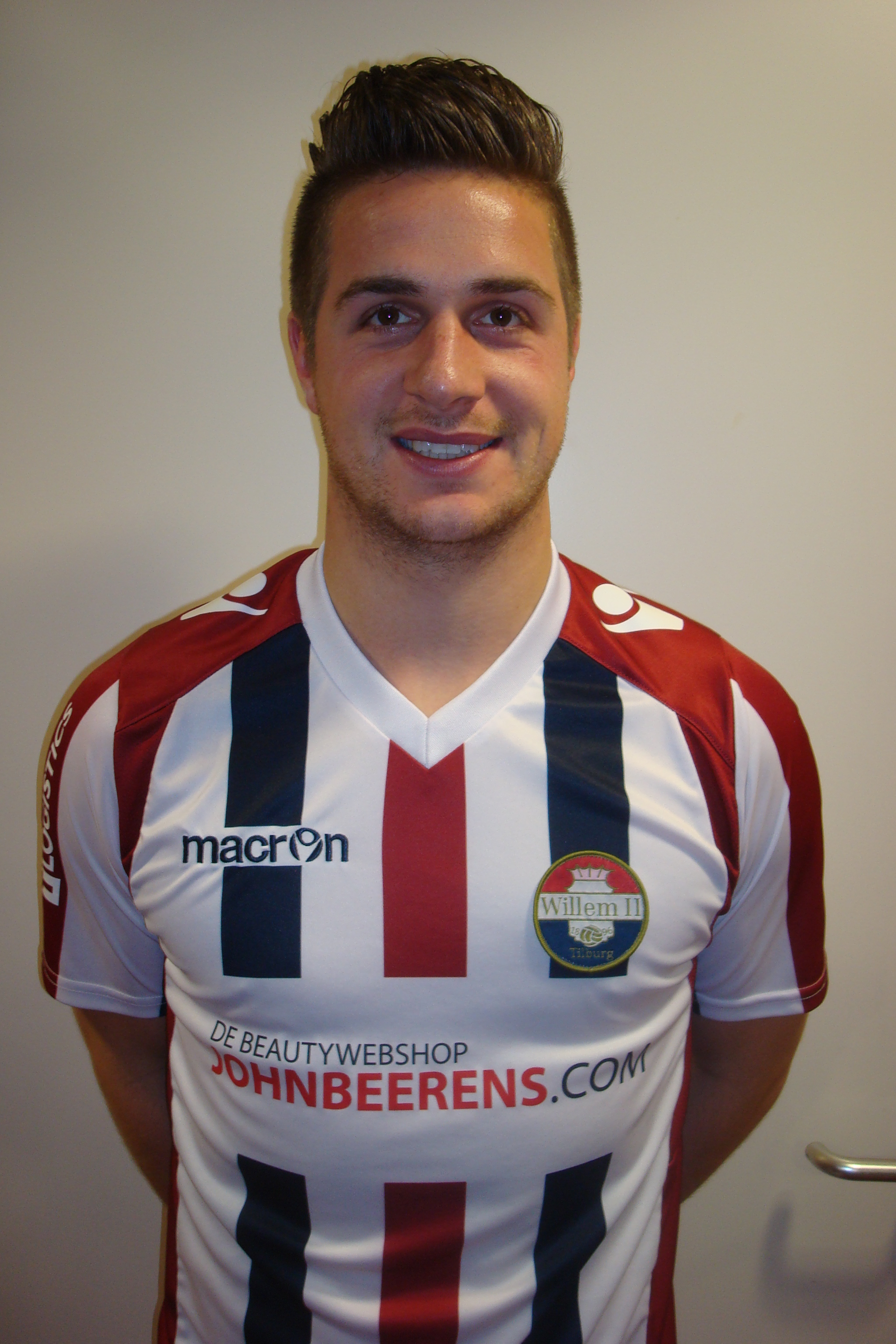 Jordens Peters in het shirt van Willem II seizoen 2013/2014